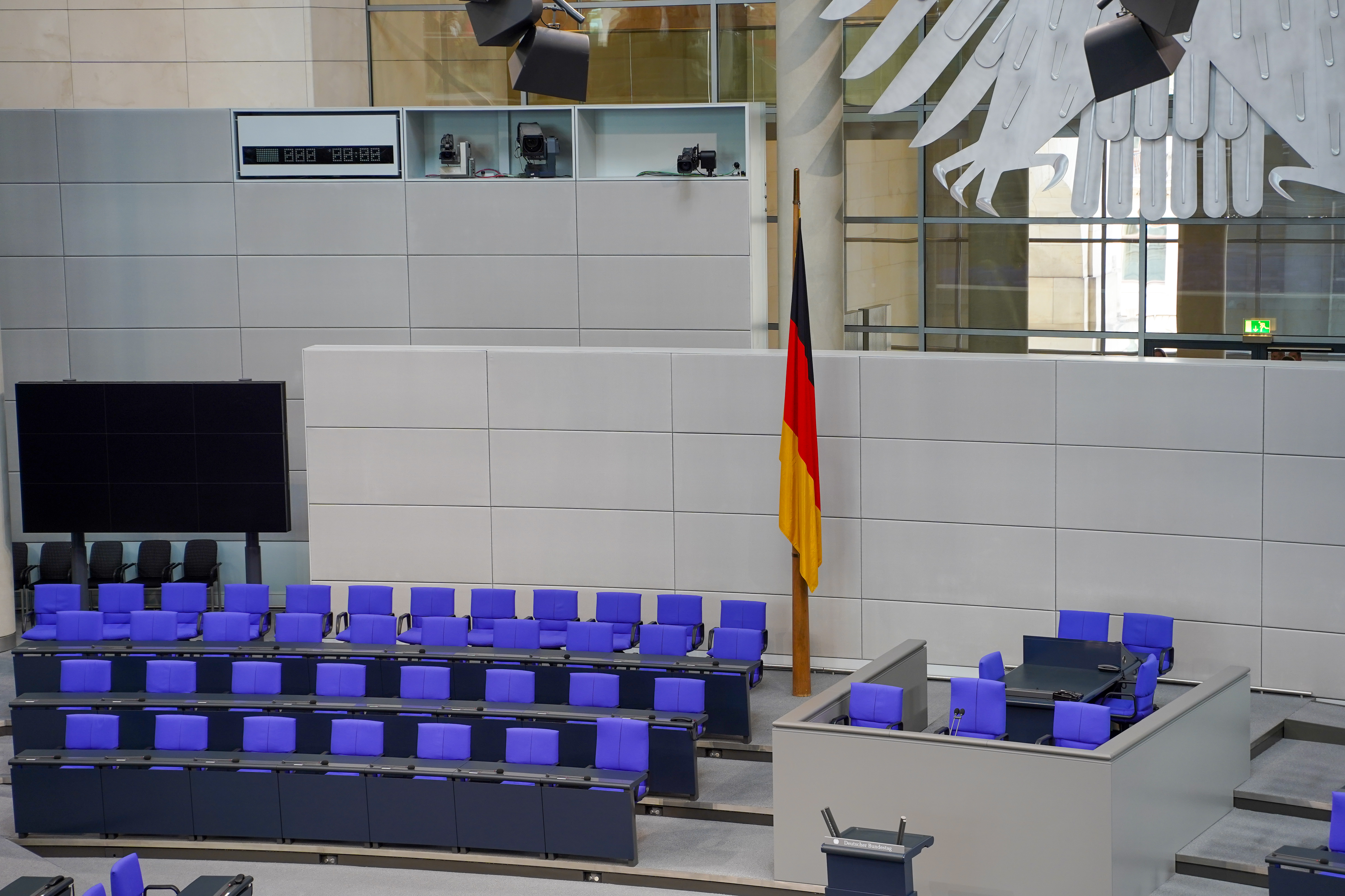 Bundestagspräsidium und Regierungsbank im Plenarsaal des Reichstagsgebäudes.